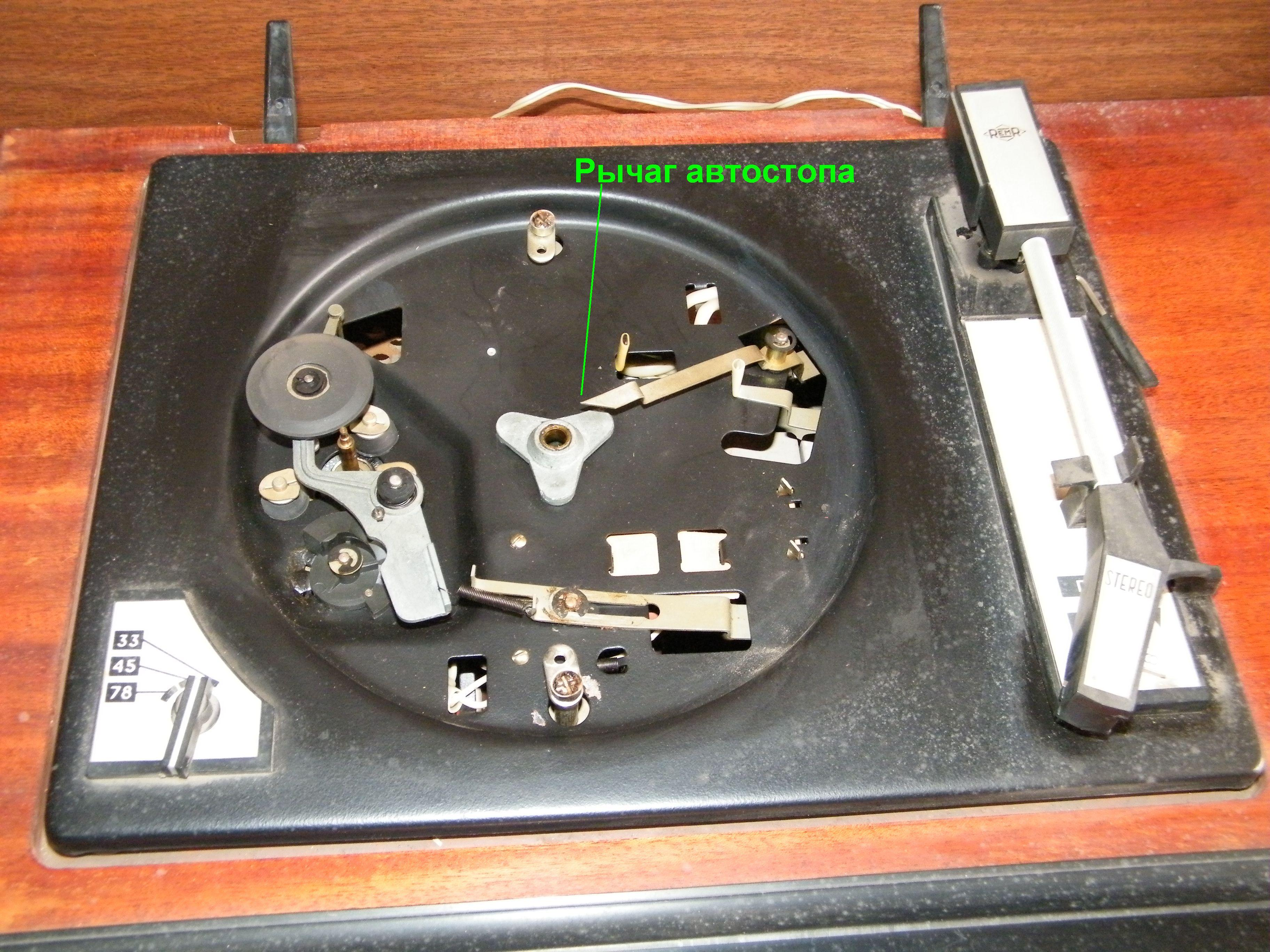 Вега-323 стерео рычаг автостопа